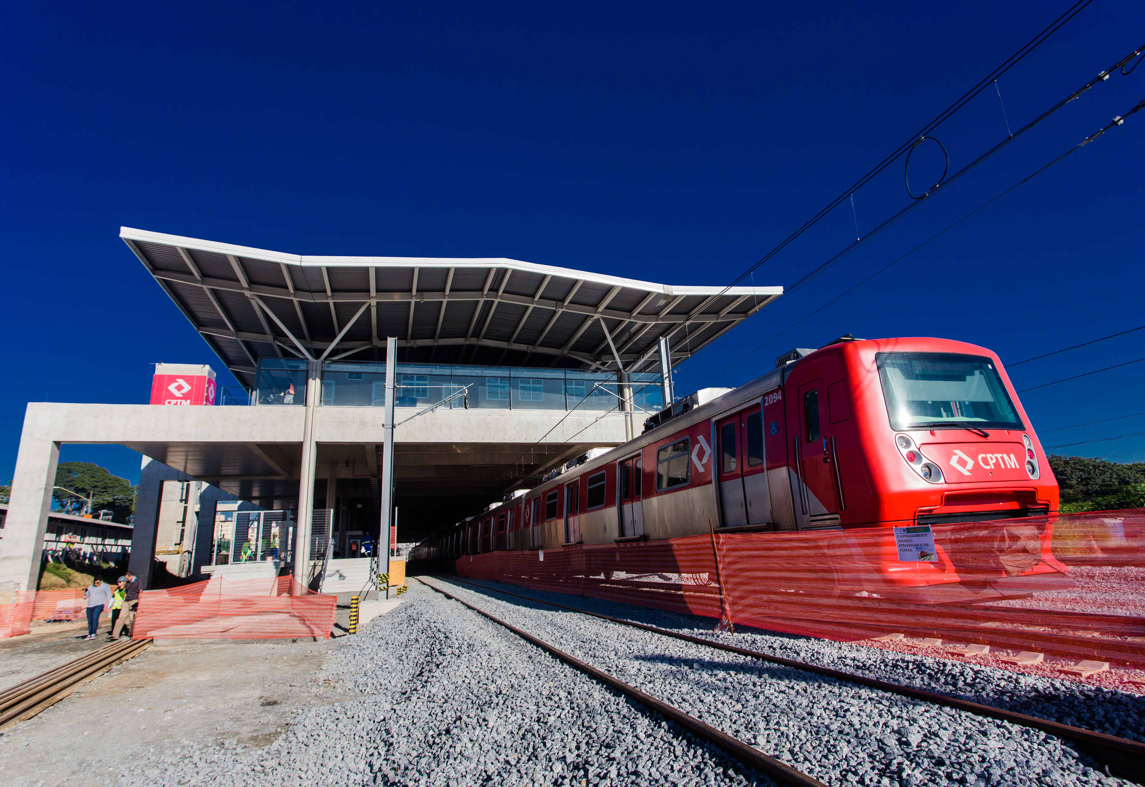 O Governador do Estado de São Paulo Geraldo Alckmin, participou de Visita Técnica às Obras da Estação Engenheiro Goulart da Linha 13-Jade, Lote 1. Local: São Paulo/SP. Data: 19/06/2017. Foto: Alexandre Carvalho/A2img